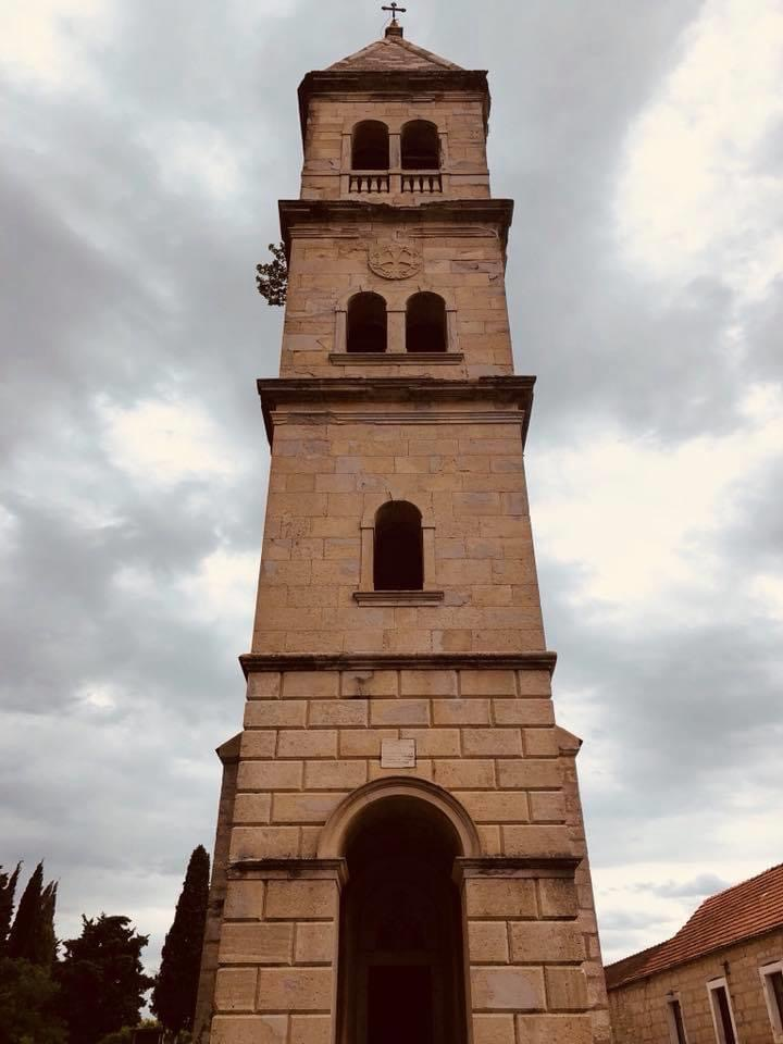 Zvonik crkve Svetog Nikole u Bratiškovcima